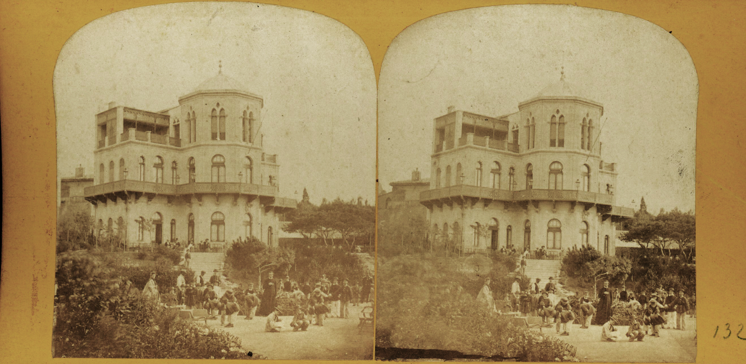 Le kiosque Bonaparte, Marseille. Guinguette édifiée par Léon Cahier en 1860-1861 et détruit en 1890. Stéréophotographie de Furne Fils et H. Tournier entre 1857-1864